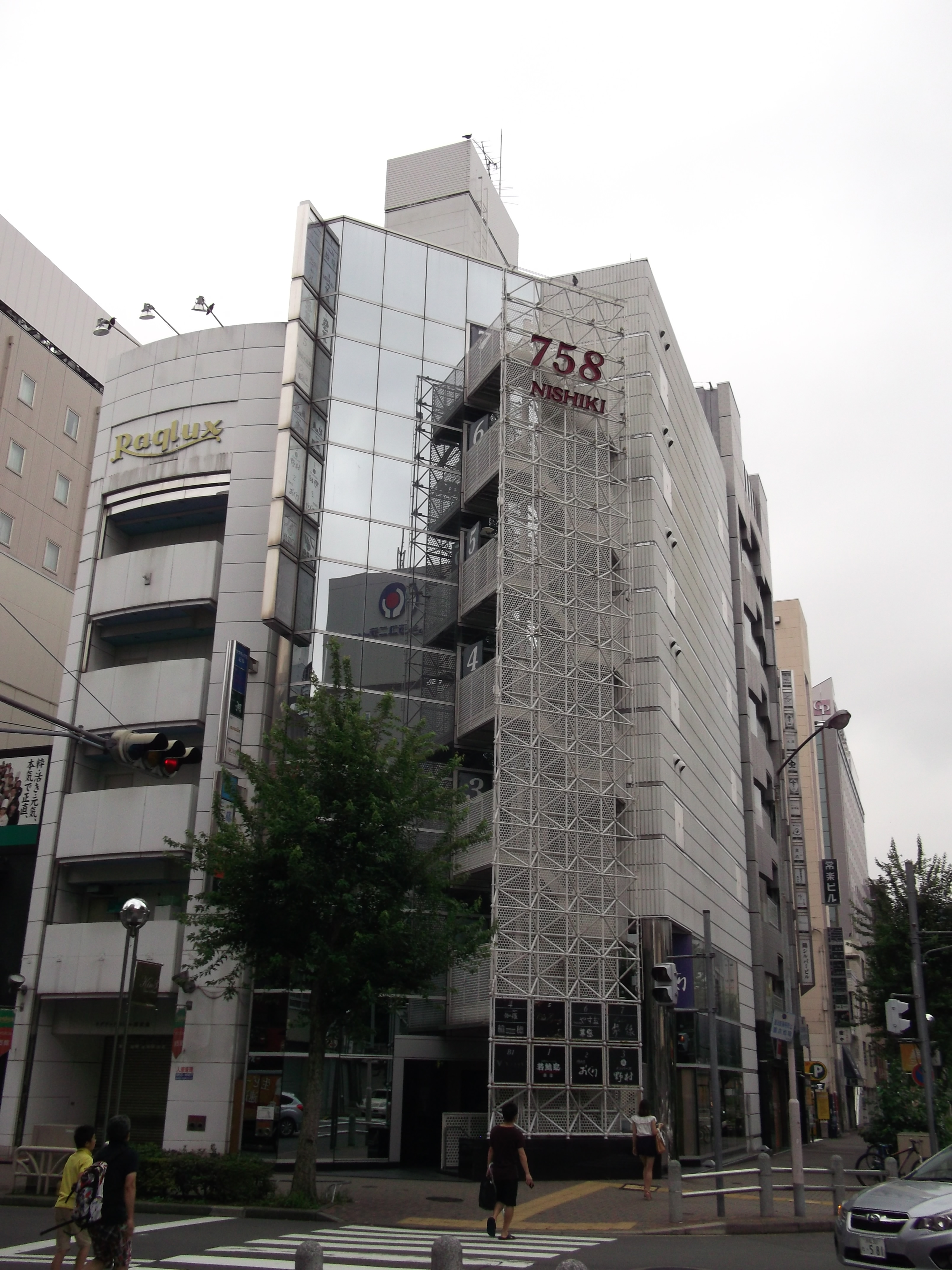 名古屋市中区錦三丁目の758ニシキビルを東側公道北側より撮影